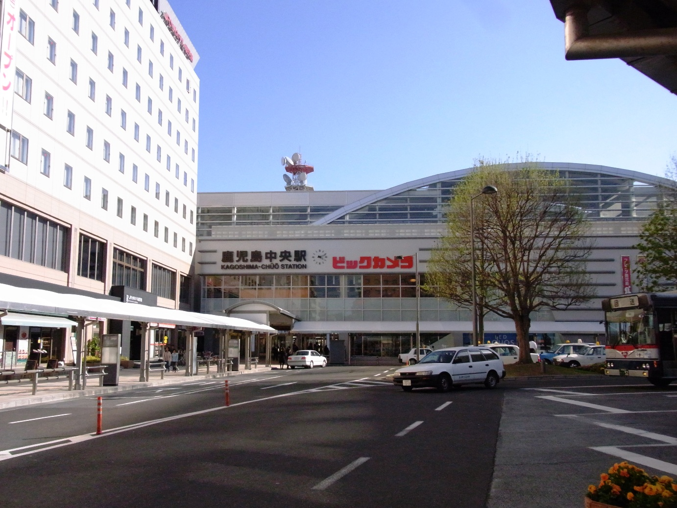 鹿児島中央駅西口